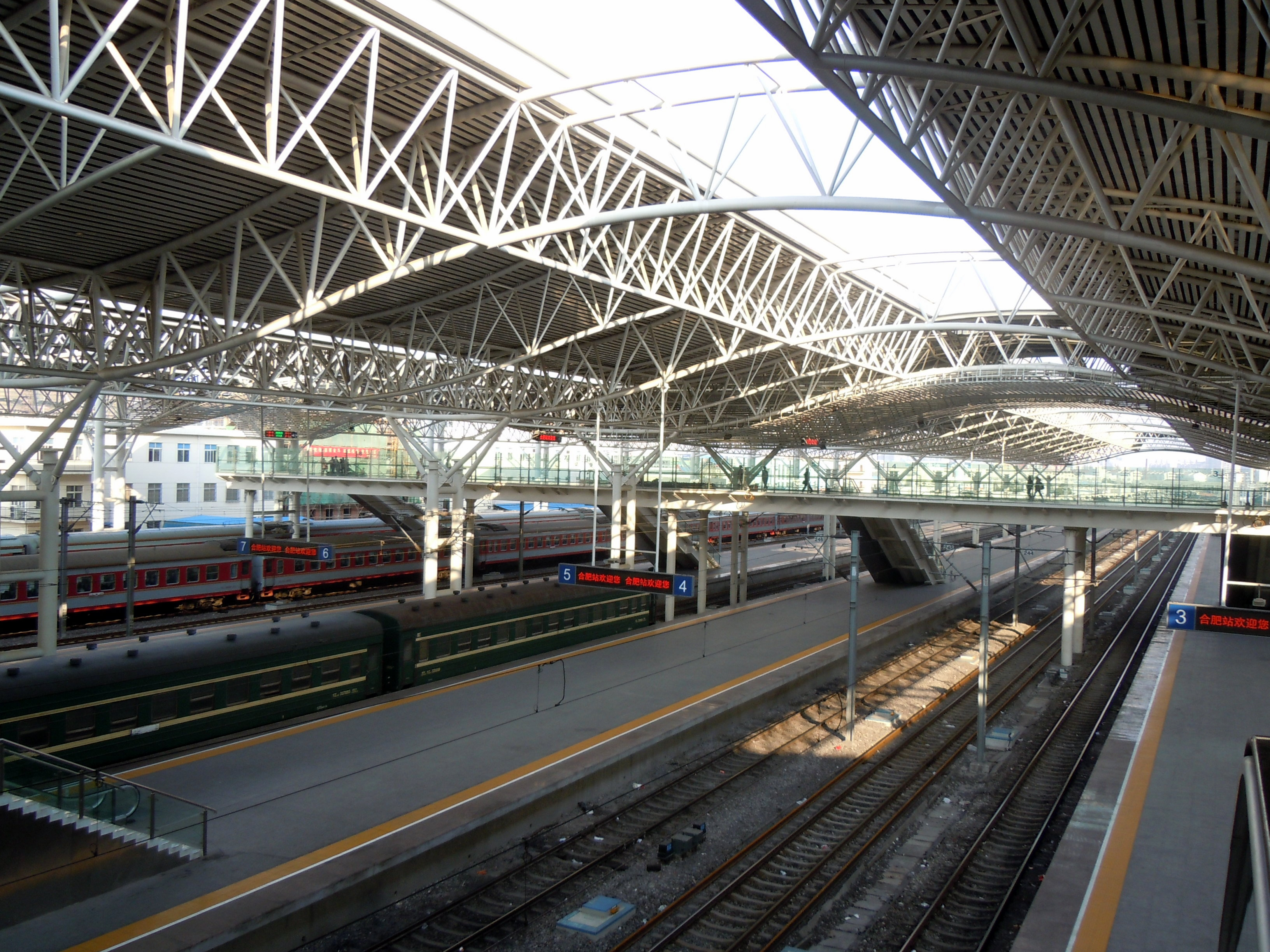 合肥火车站站台